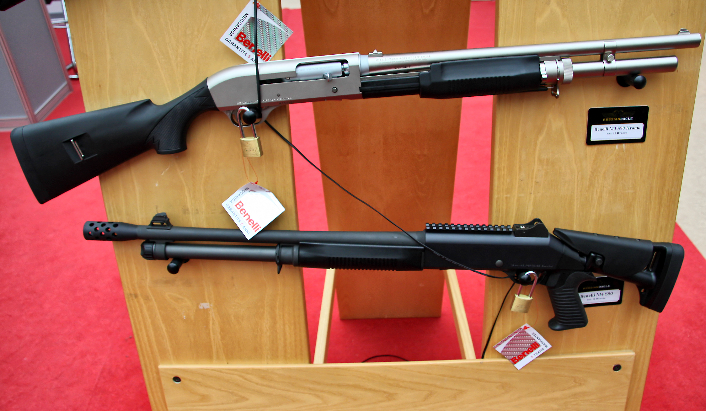 Benelli M3 Super 90 Kromo и Benelli M4 Super 90